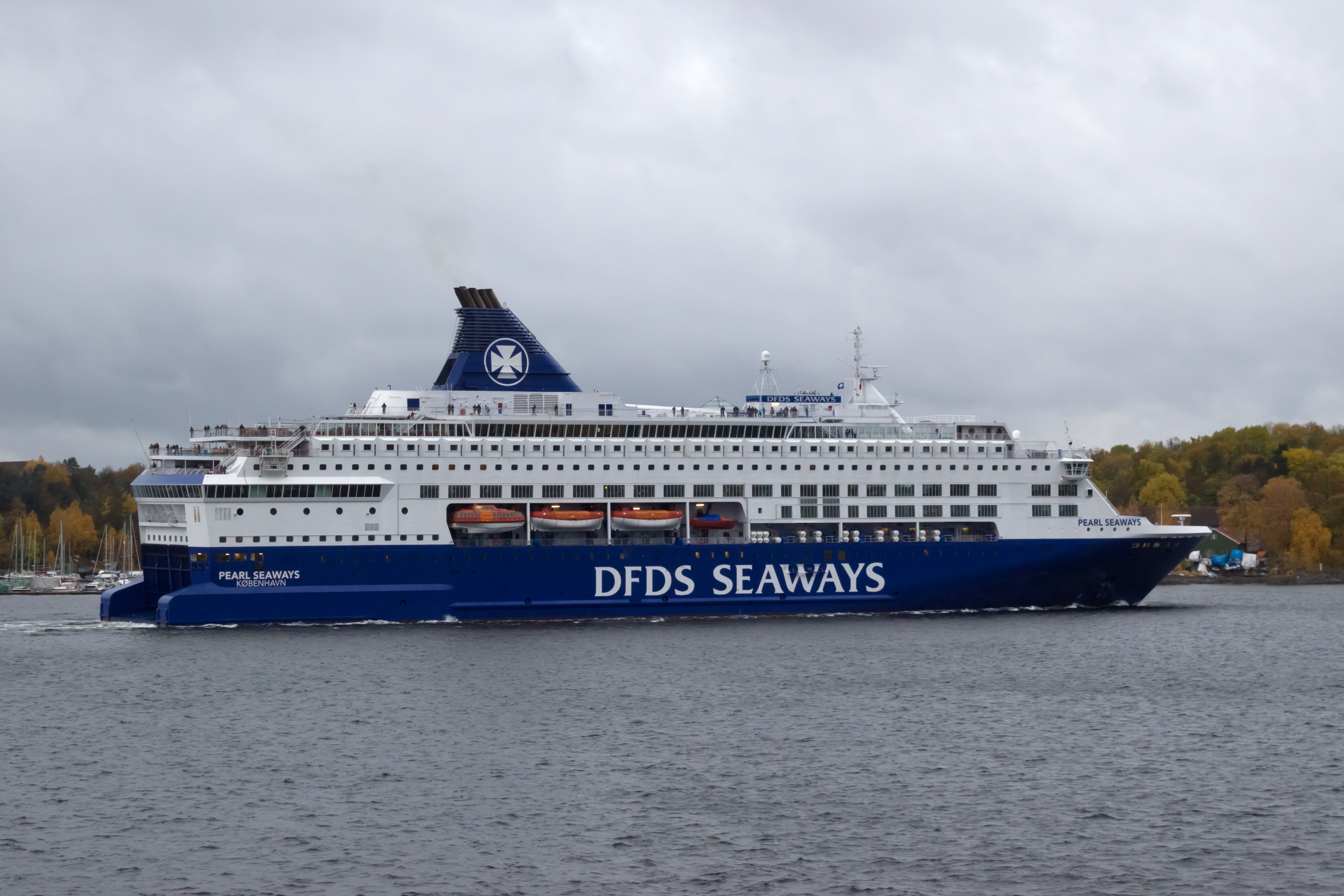 Ferri-cruceiro Pearl Seaways en Oslo.